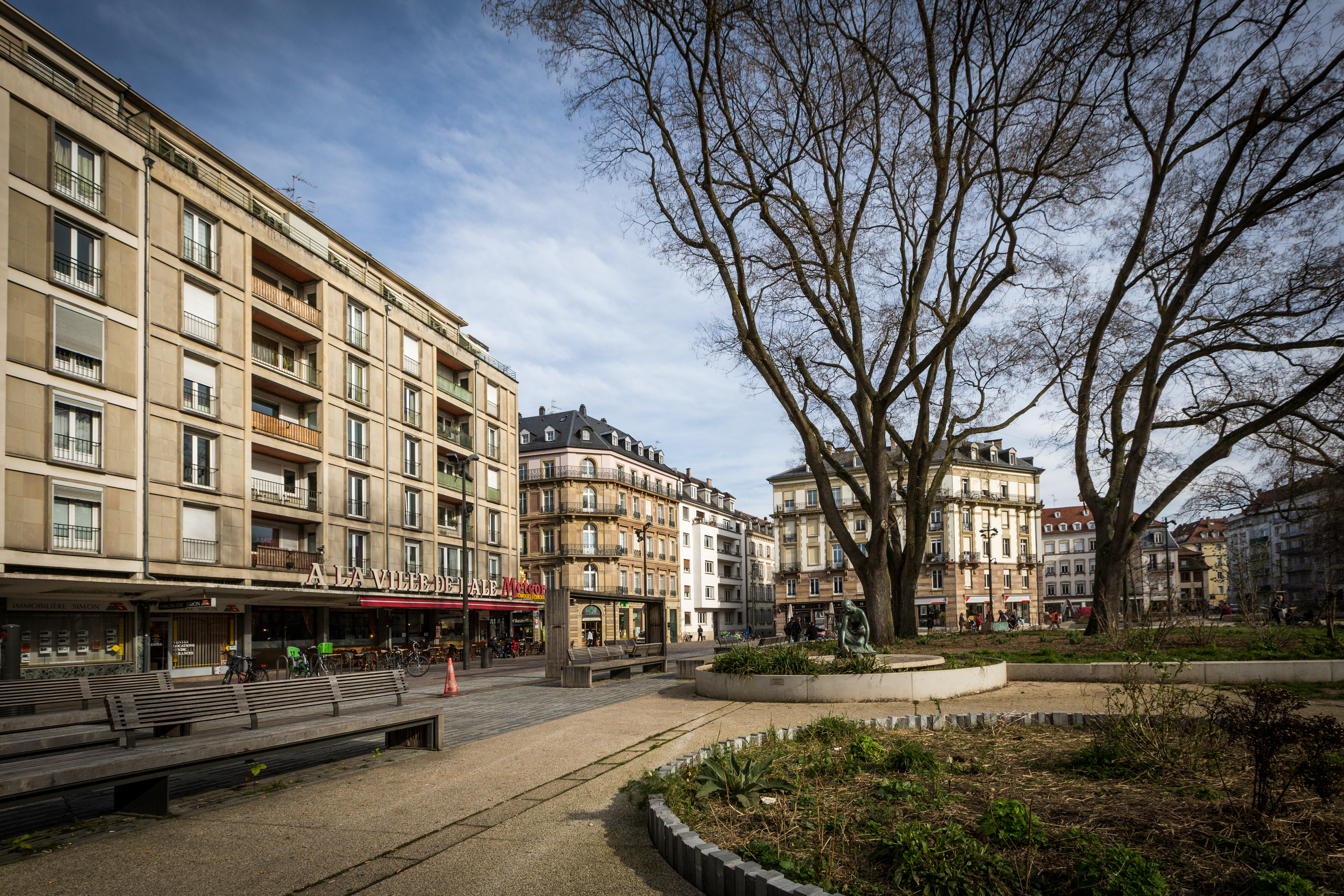 Strasbourg place d'Austerlitz février 2014